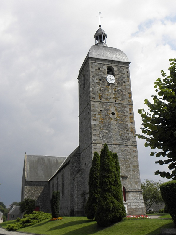 Église paroissiale Notre-Dame d'Aucey-la-Plaine (50).